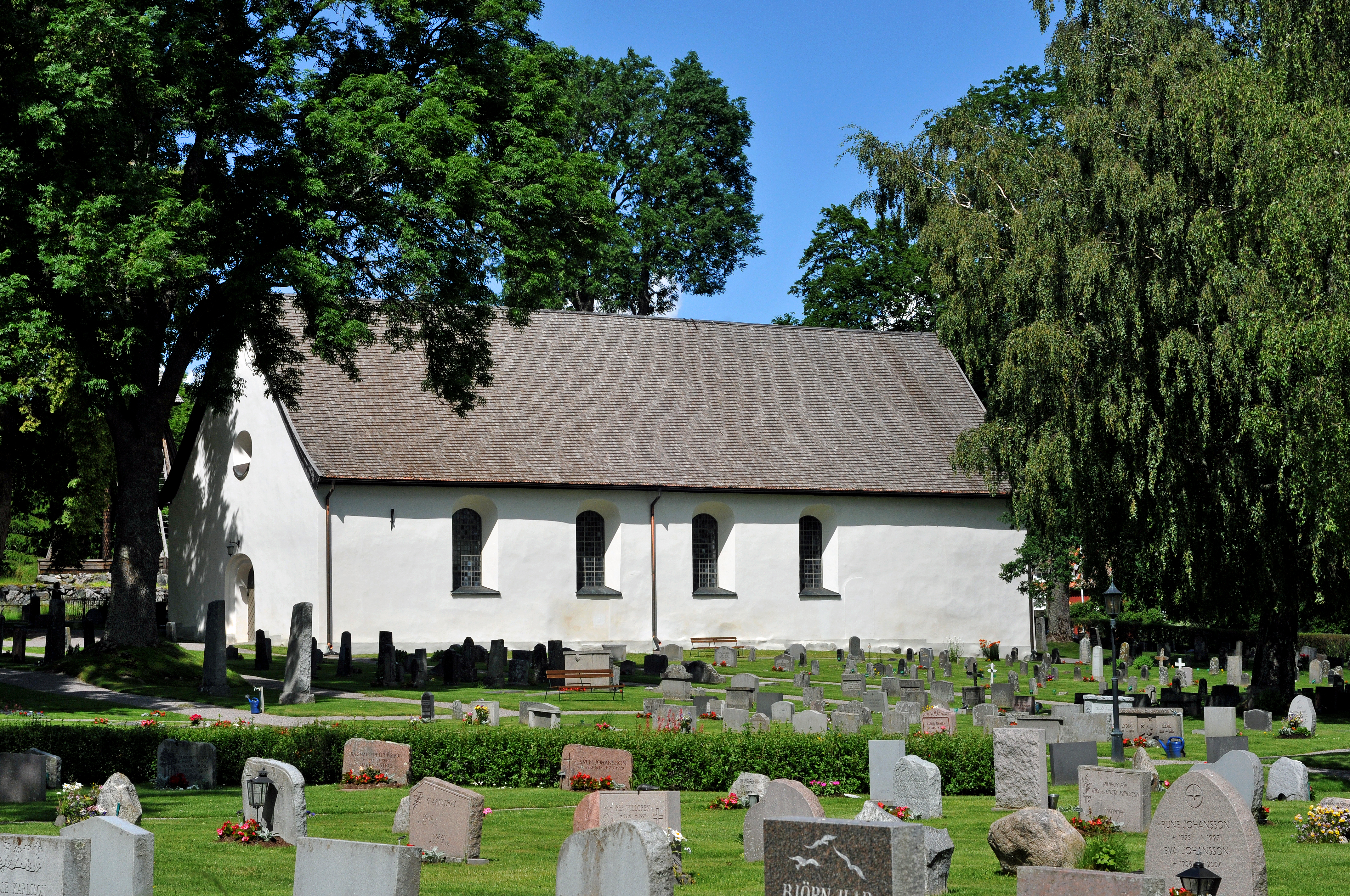 Näshulta kyrka i Eskilstuna kommun